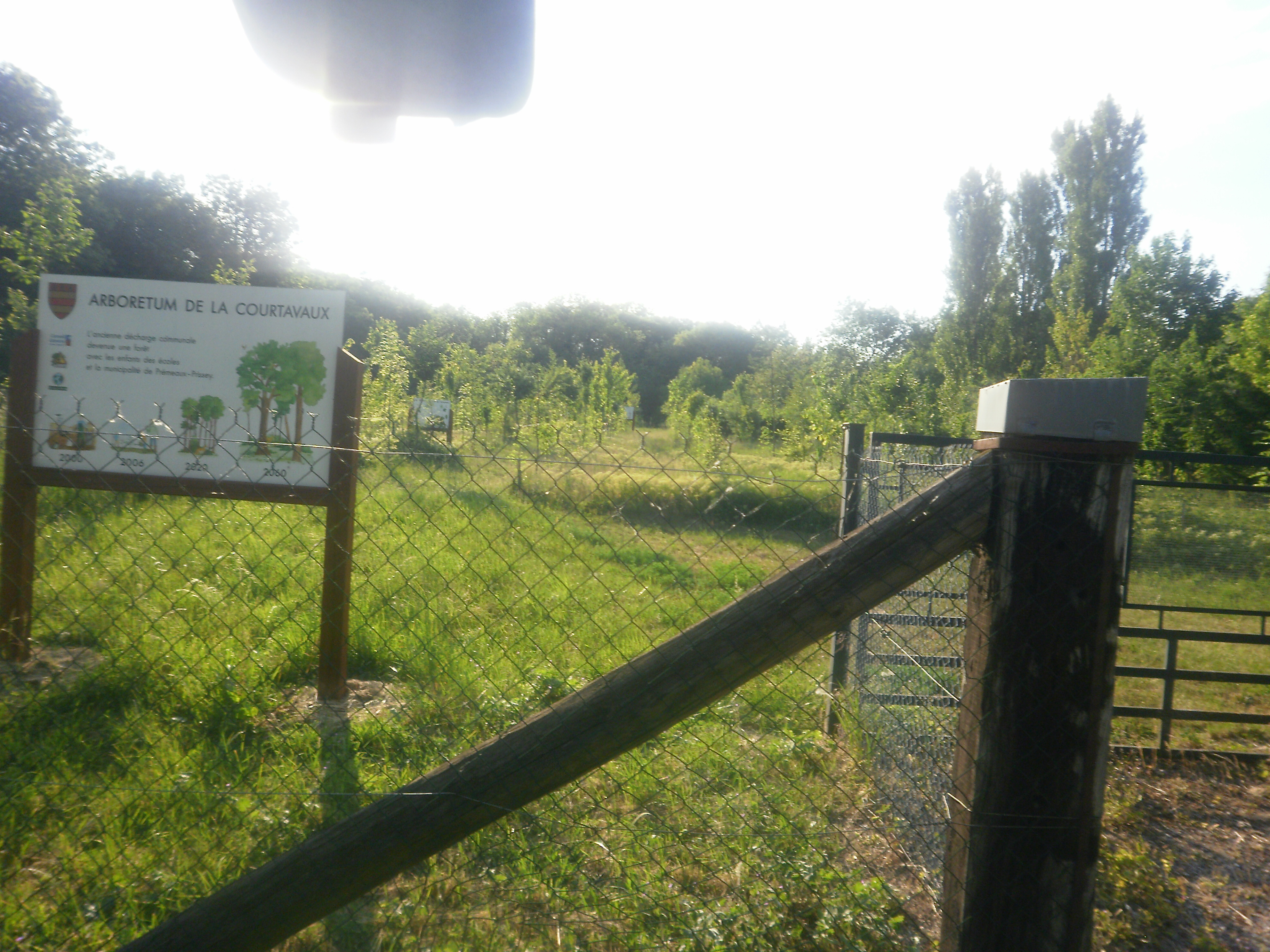 Photo de l'arboretum de Premeaux-Prissey, planté sur l'ancienne décharge municipale.